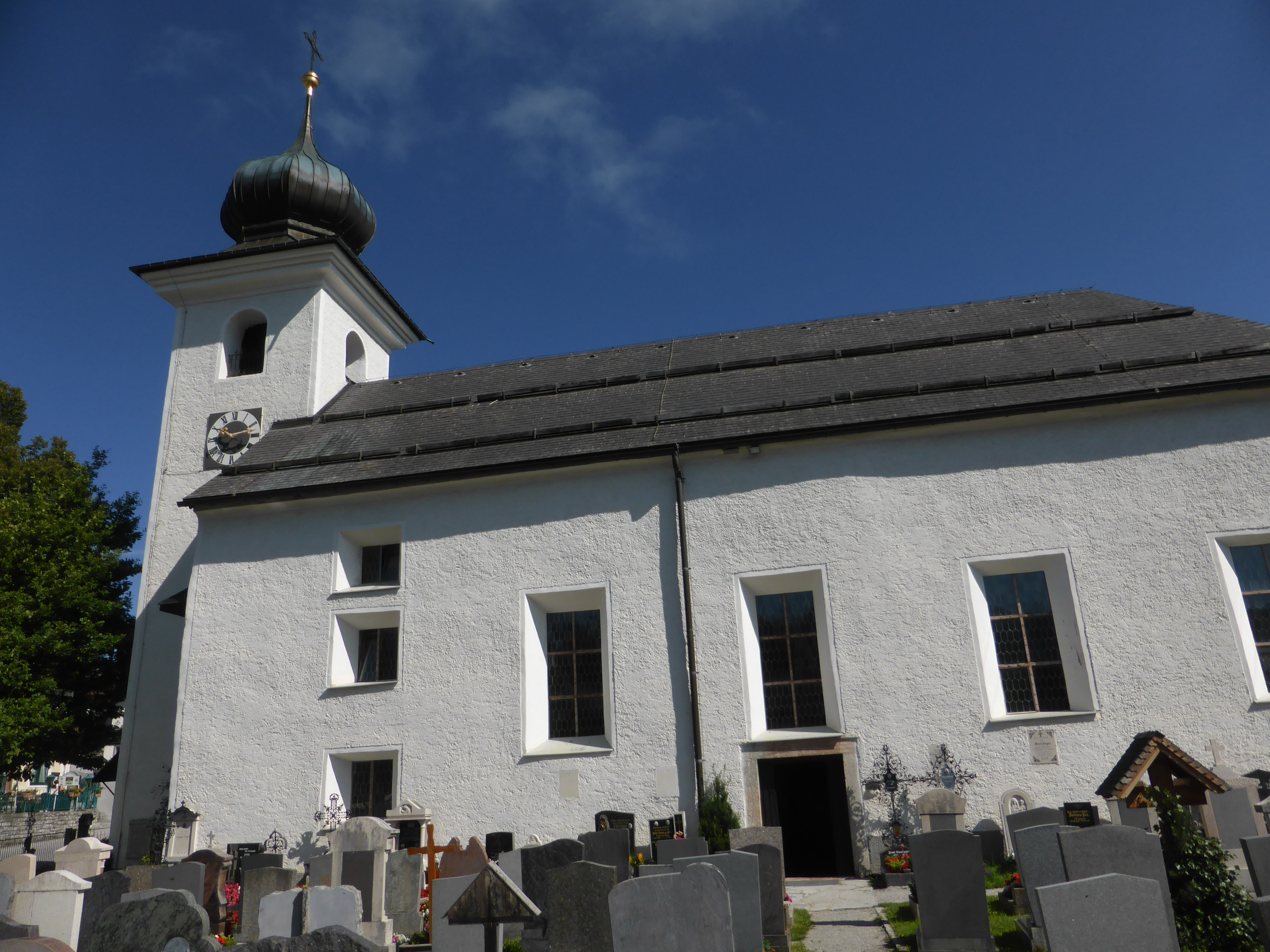 Kath. Pfarrkirche hl. Koloman